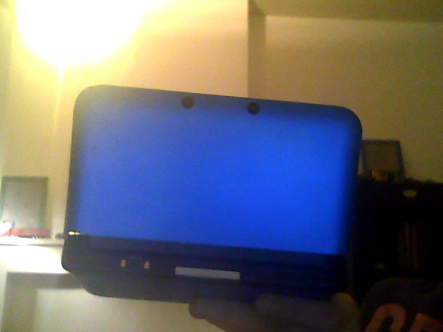 Nintendo 3DS XL